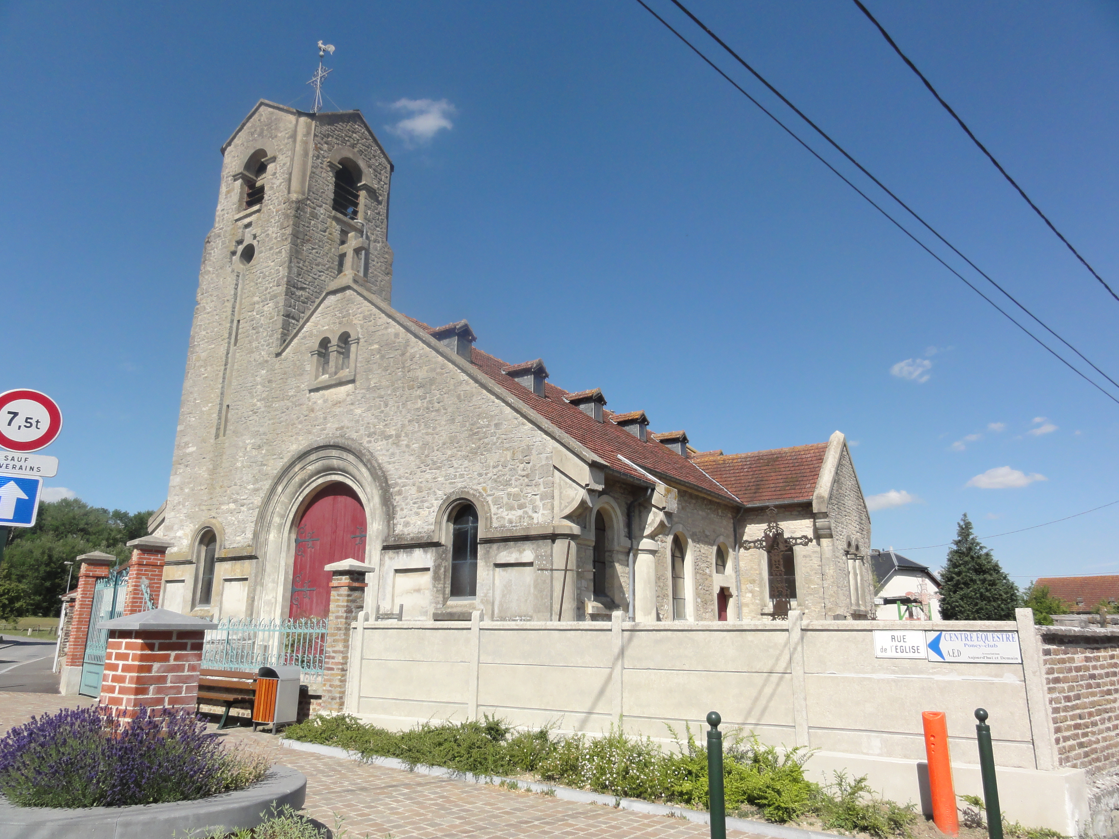 Goudelancourt-lès-Berrieux (Aisne) église